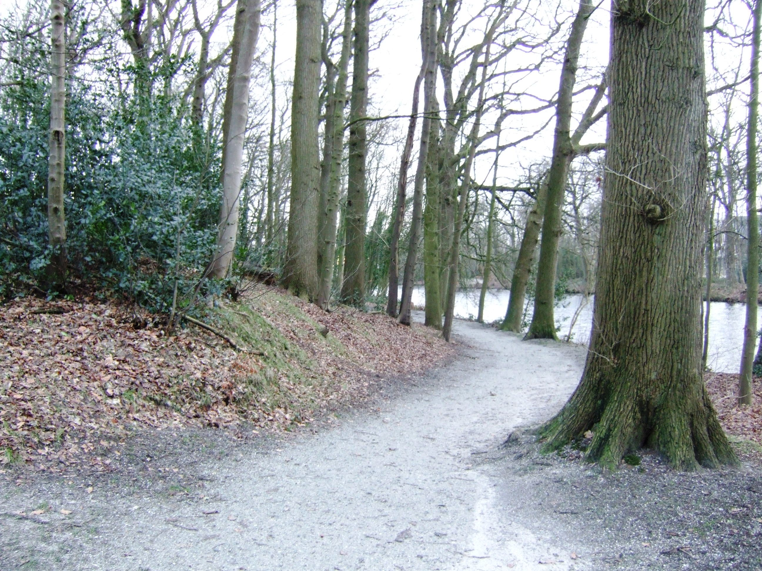 Kronkelpad naast de grote vijver.